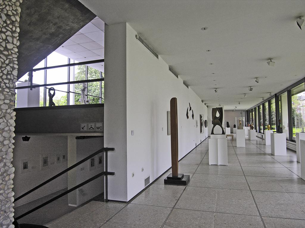 Lehmbruck-Museum, Innenansicht Fotograf: Hans Peter Schaefer Url